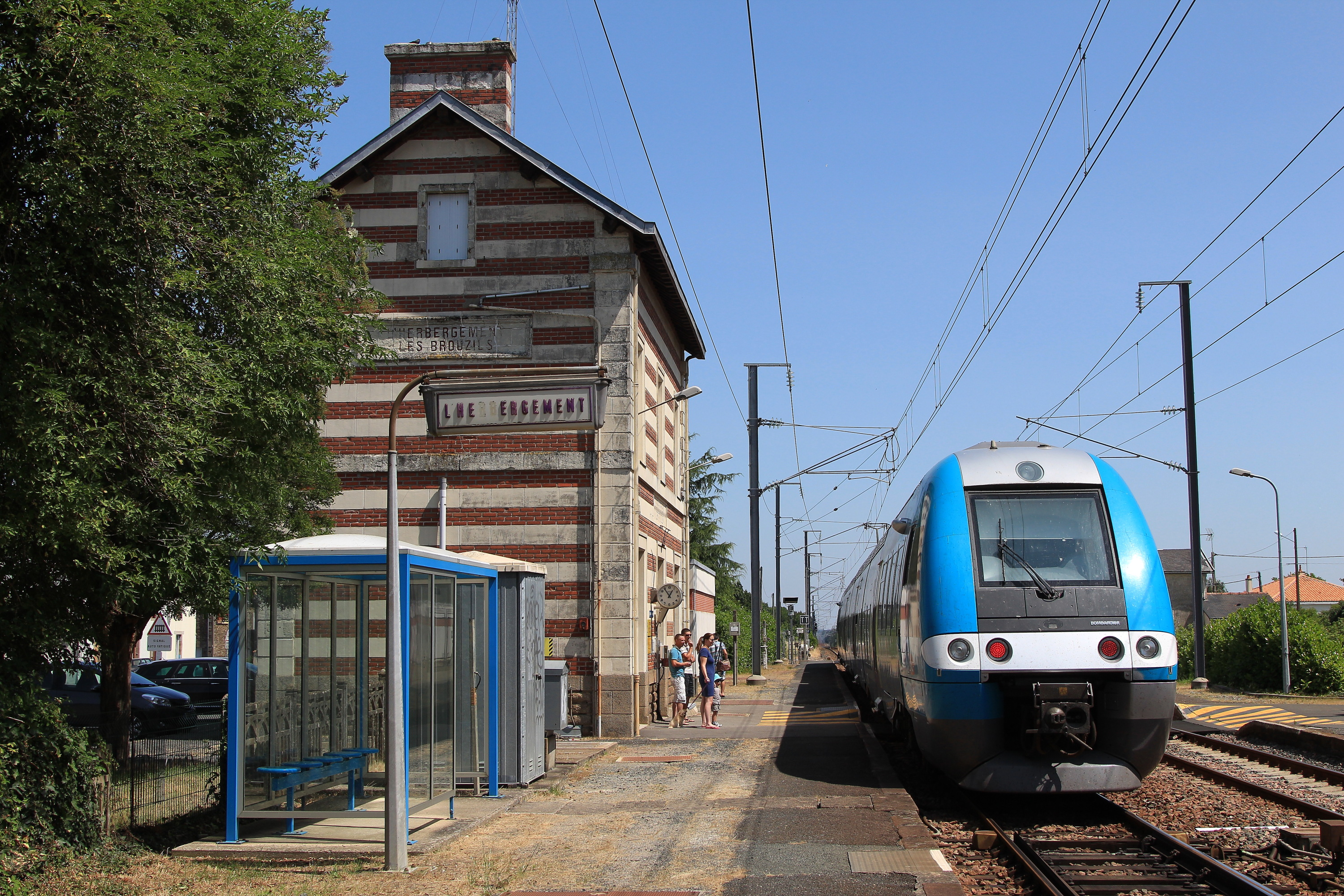 Une ZGC (Z 27500) desservant la gare de L'Herbergement, en direction de Nantes.